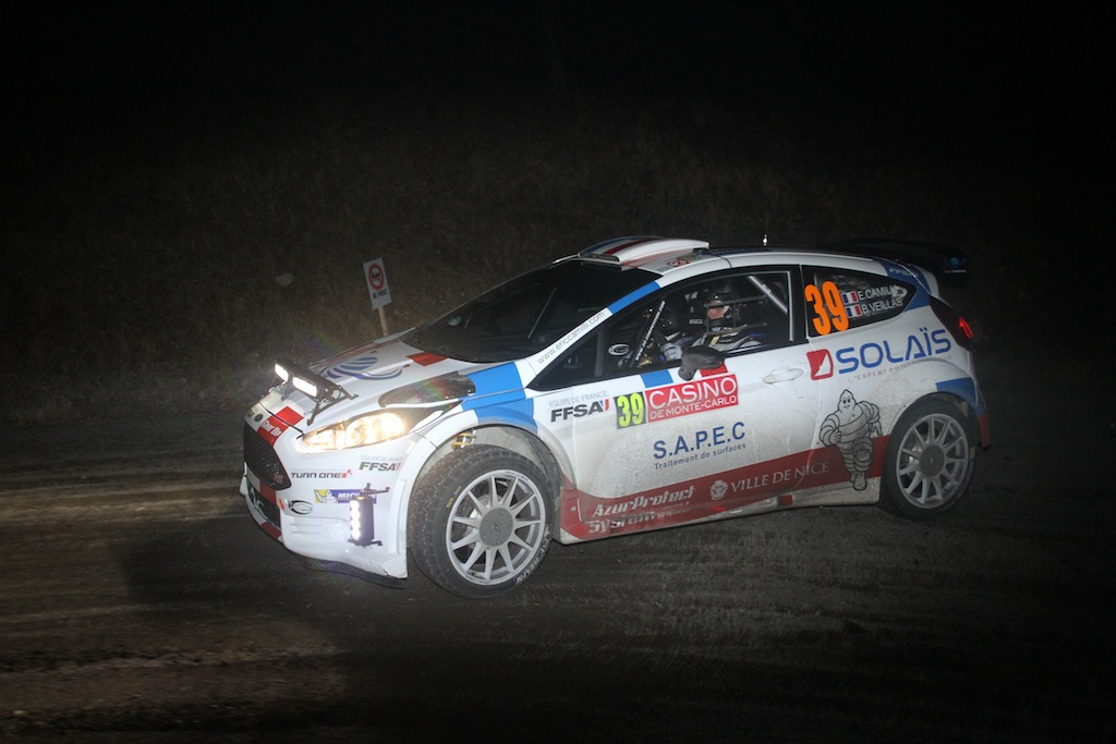 ES Corobin